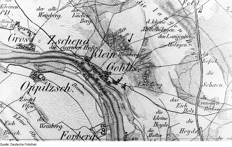 Original image description from the Deutsche Fotothek Zeithain-Gohlis. Oberreit, Sect. Oschatz, 1839/40